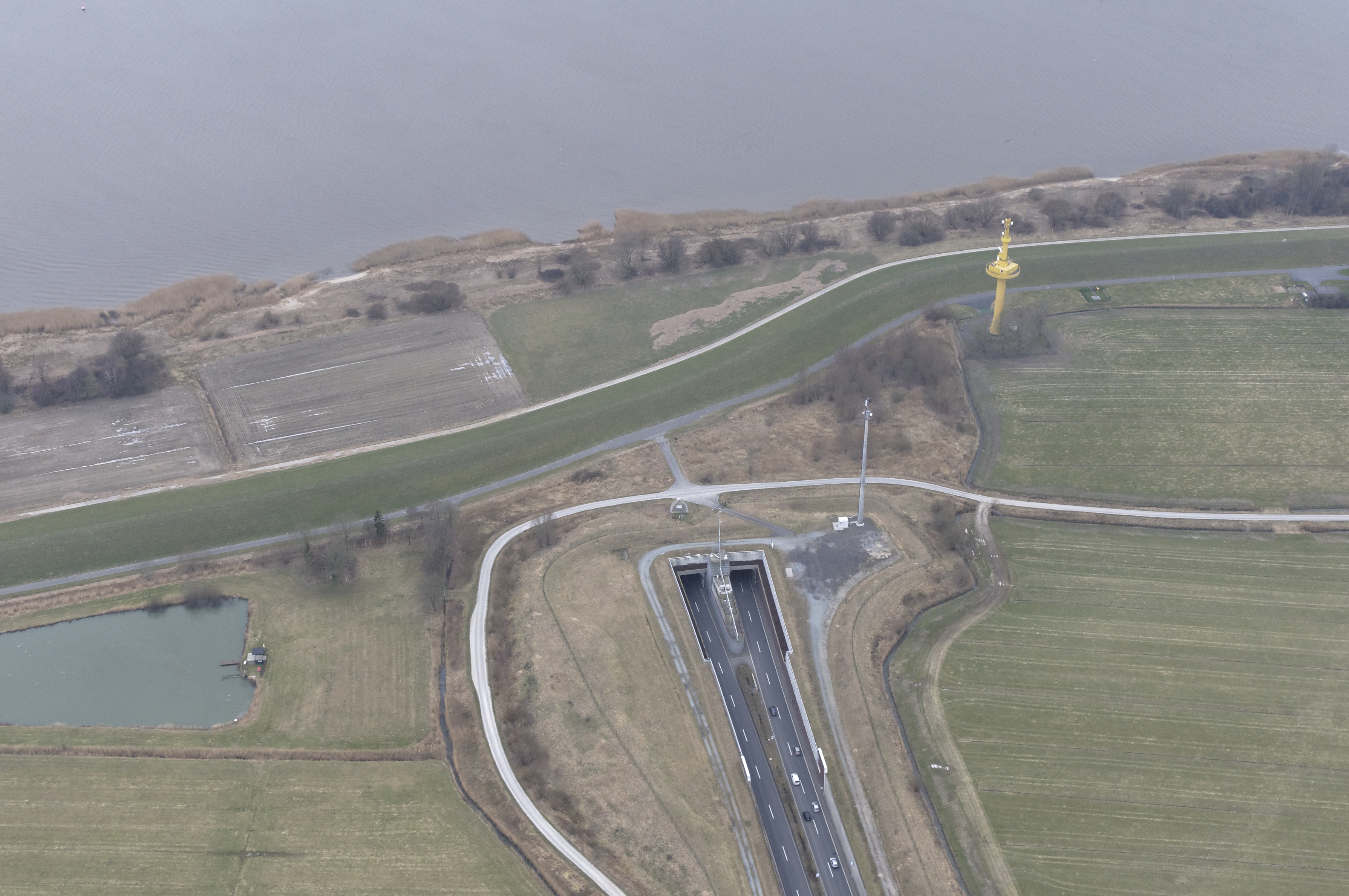 Luftaufnahme: Wesertunnel, Einfahrt Ost in Loxstedt